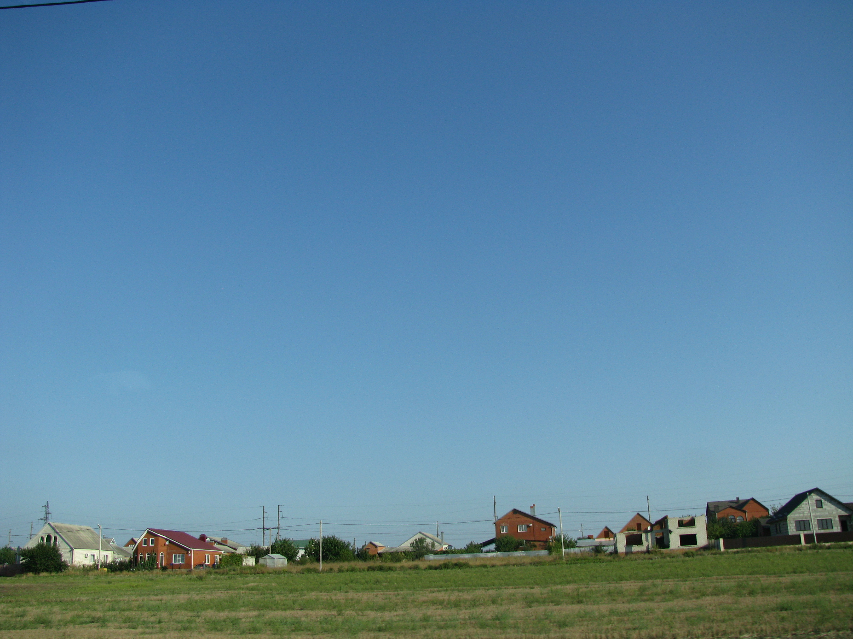 Домики в Брюховецкой (вид с трассы)